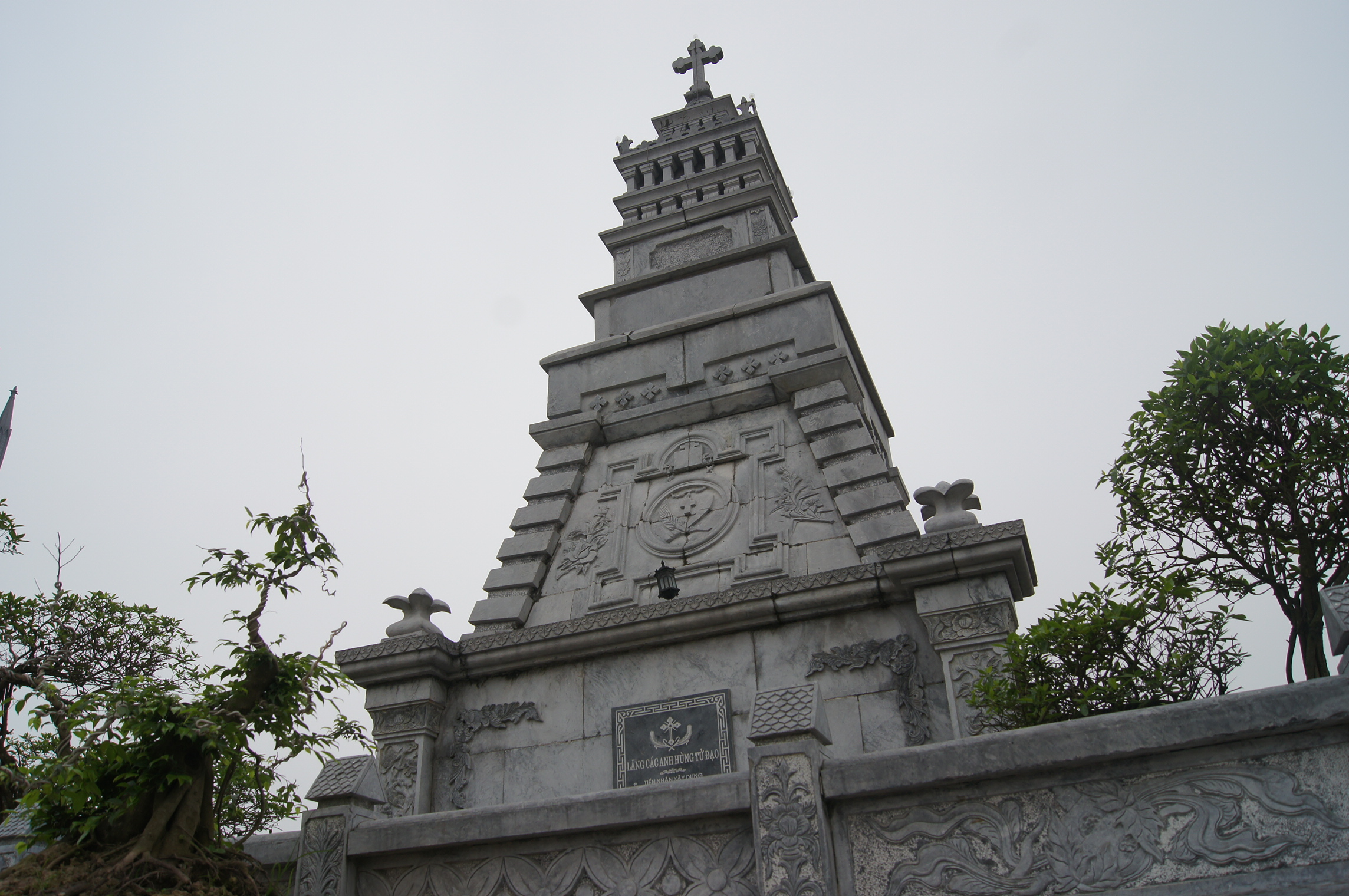 Lăng lưu trữ hài cốt các thánh tử đạo tại Vương cung thánh đường Phú Nhai, Nam Định